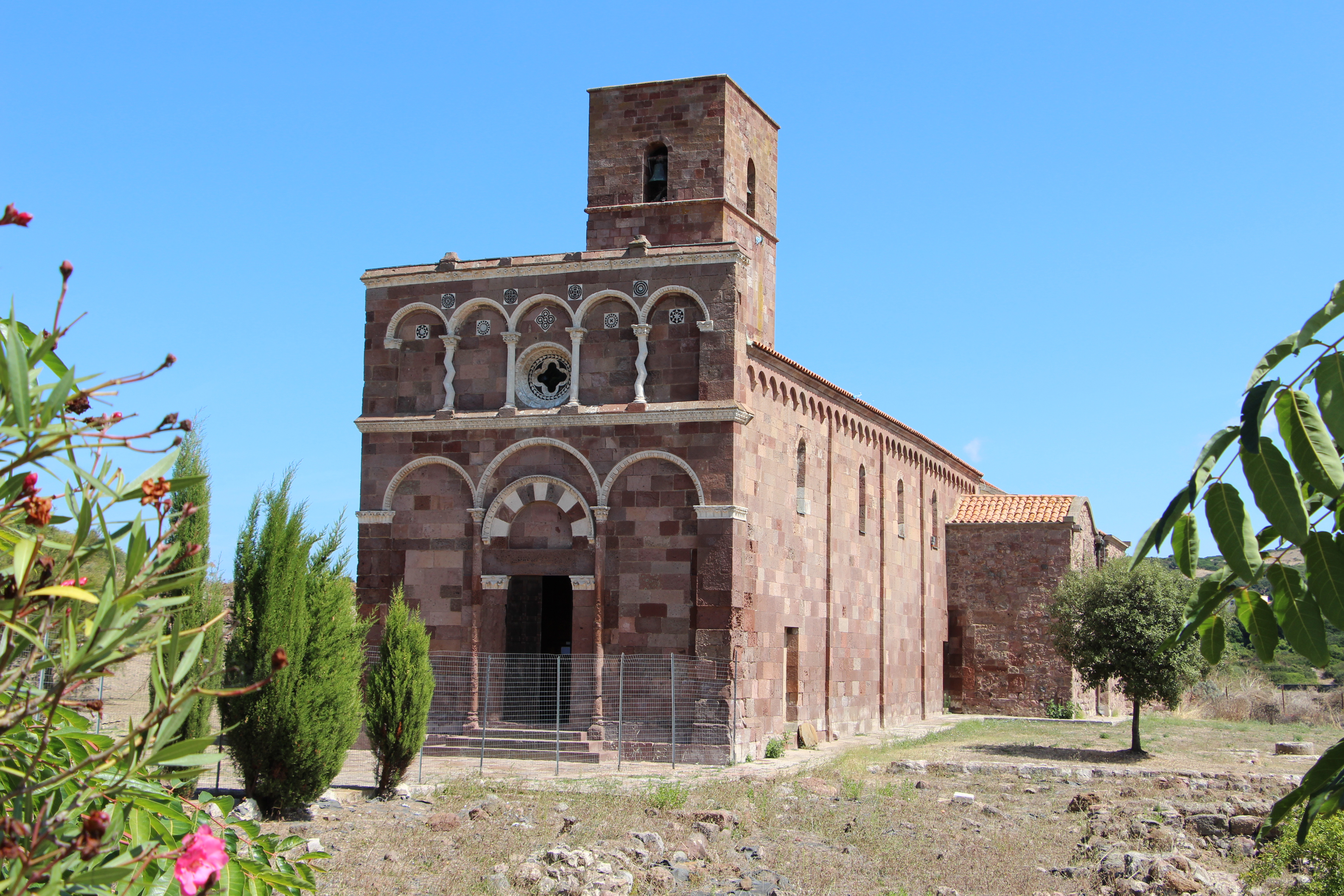 Nostra Signora (Tergu)